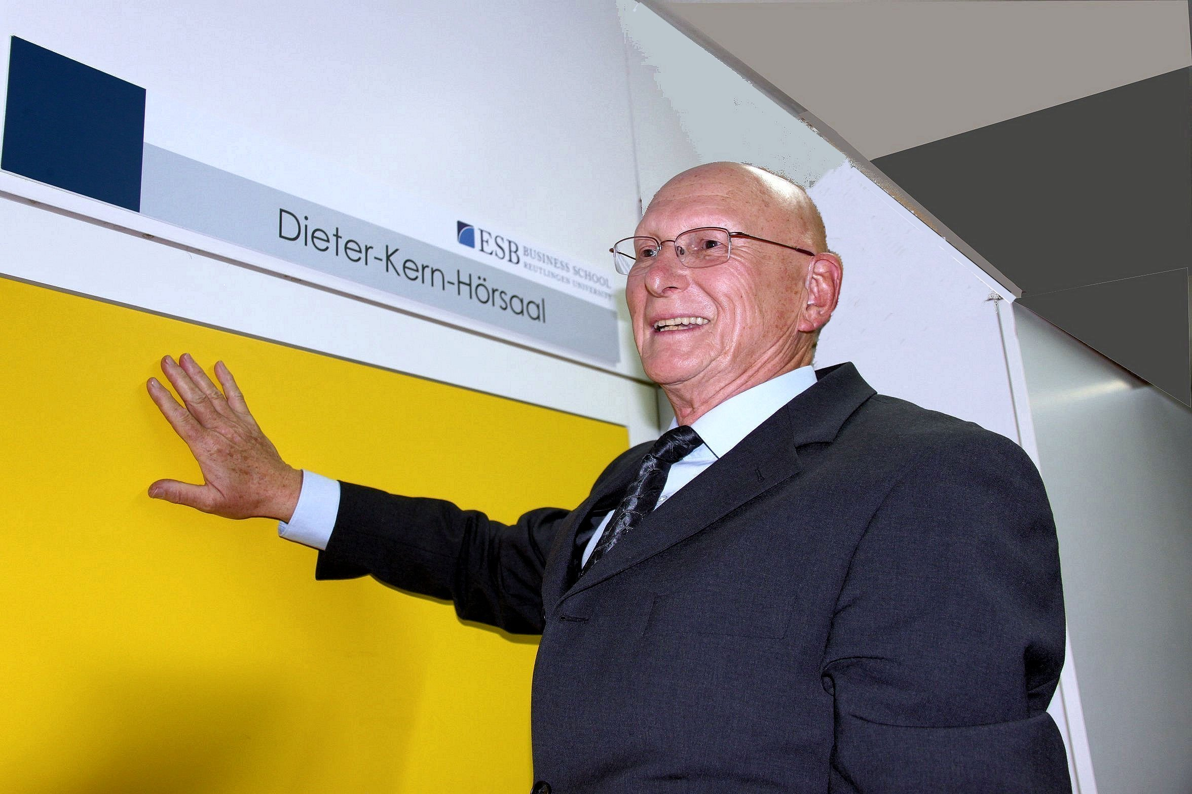 Prof. K.D.Kern vor dem ihm gewidmeten Hörsaal als Gründungsmitglied der Wirtschaftsfakultät an der Reutlingen University